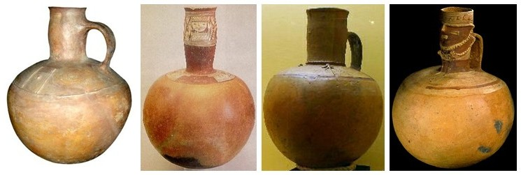 Cuatro ollas múcuras. Vasijas precolombinas de las culturas Muisca y Chibcha de Colombia, usadas también en Venezuela y Cuba. Ánforas o cántarillas de barro arcilloso para conservar el agua.